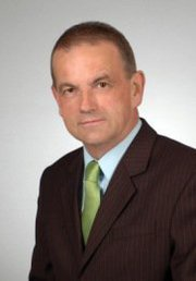 poseł Dariusz Lipiński